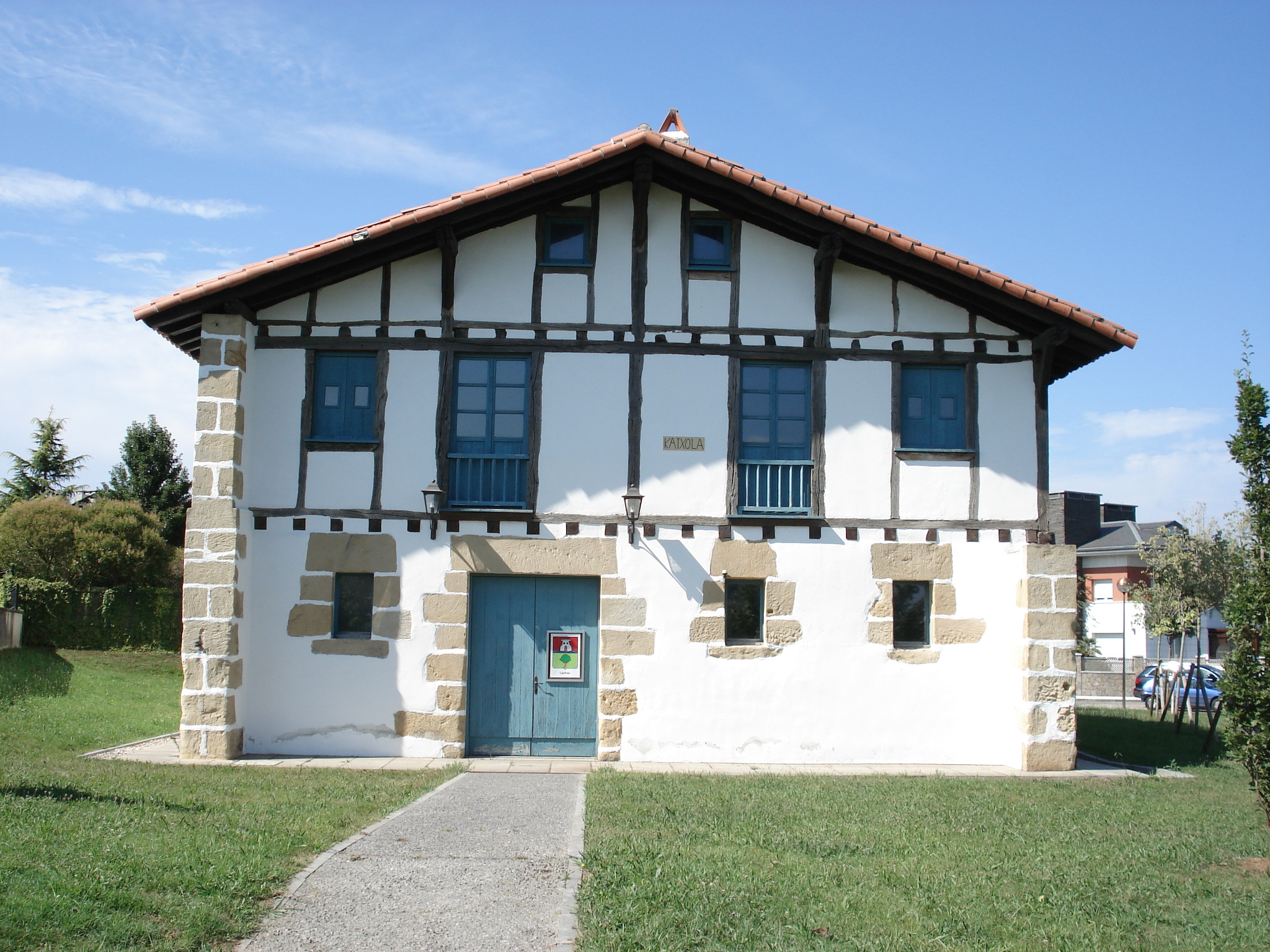 Katxola Baserria, Donostia-San Sebastian